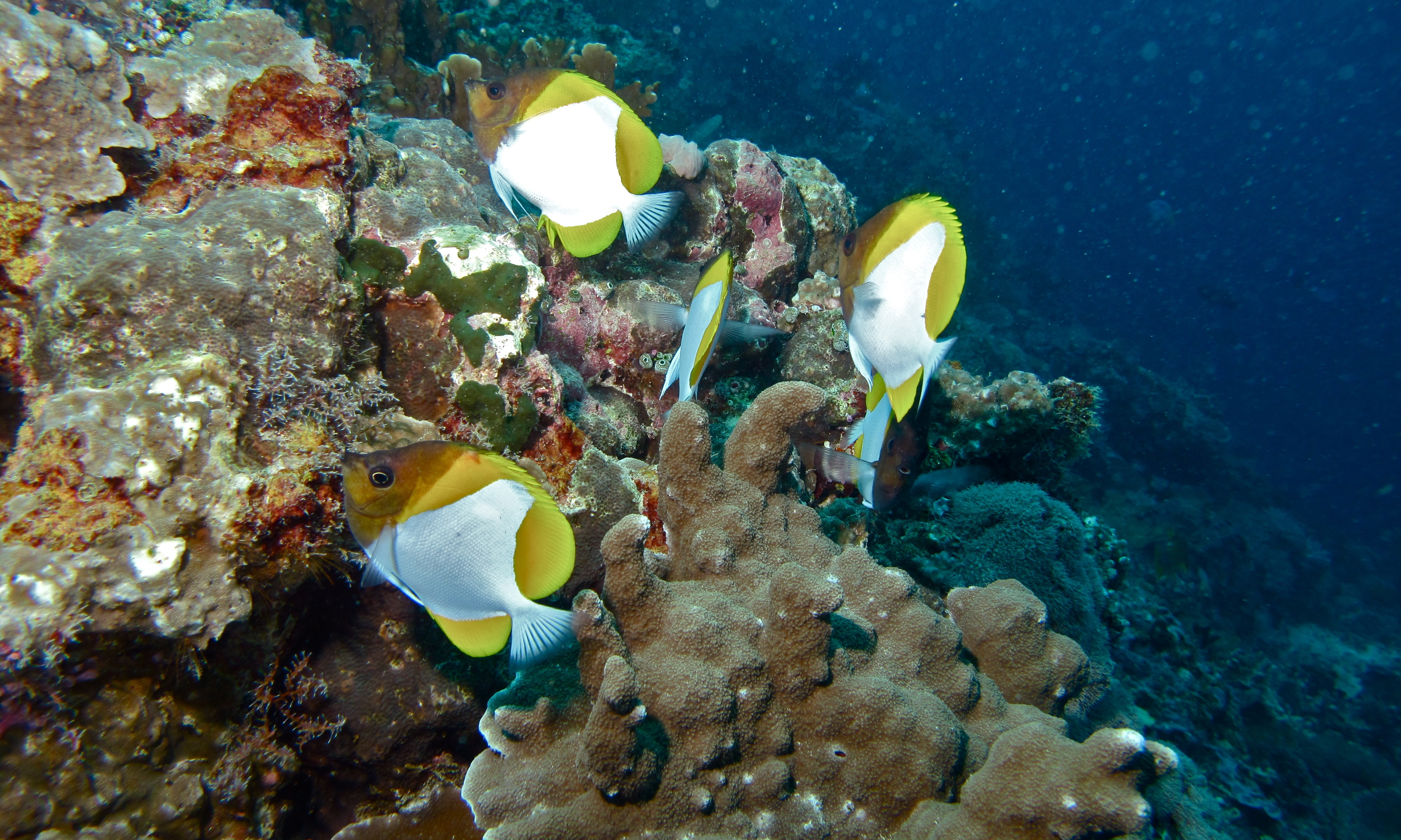 South Point, Pulau Sipadan, Sabah, MALAYSIA